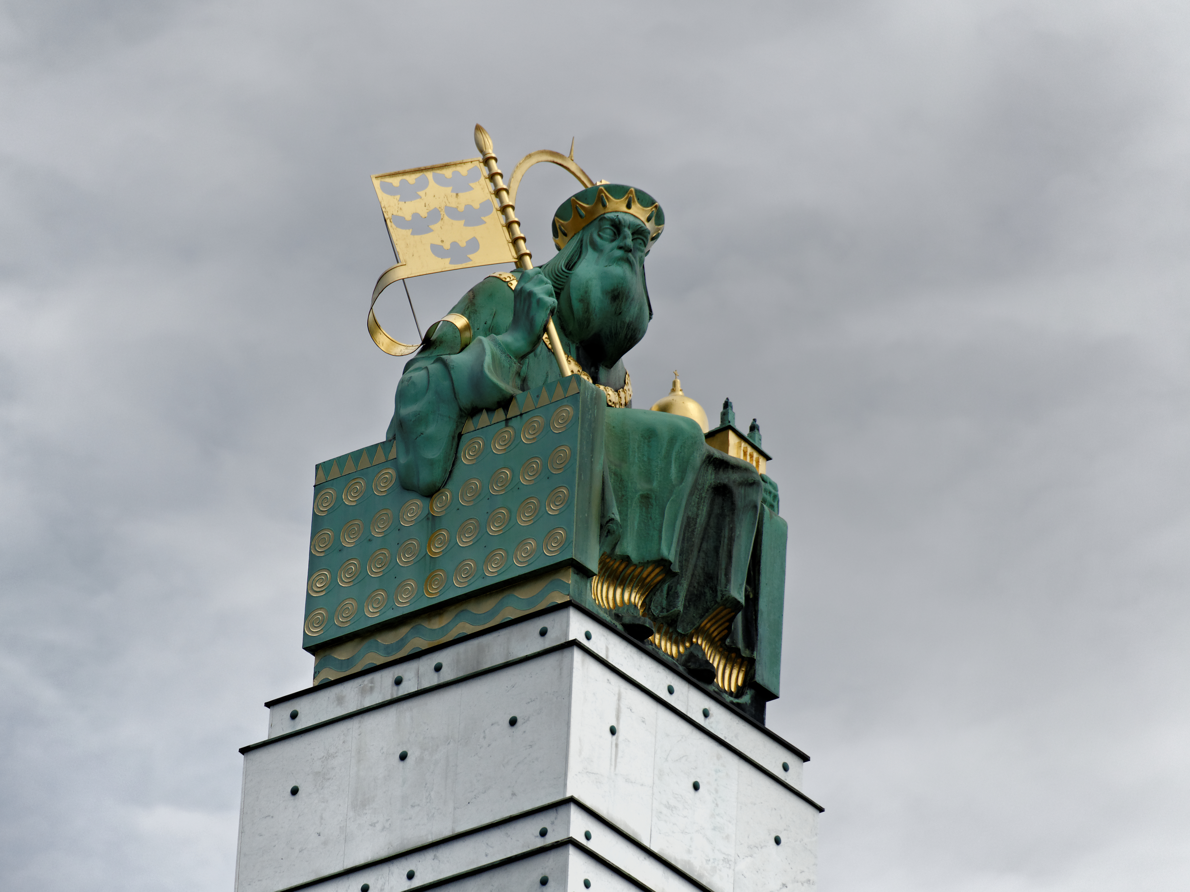 Léopold III d'Autriche, Kirche am Steinhof, Vienne (Autriche). Église construite par Otto Wagner entre 1902 et 1907. Sur les deux clochetons encadrant la façade, des saints (Léopold à droite,Séverin à gauche) par Richard Luksch occupent des sièges dessinés par Josef Hoffmann